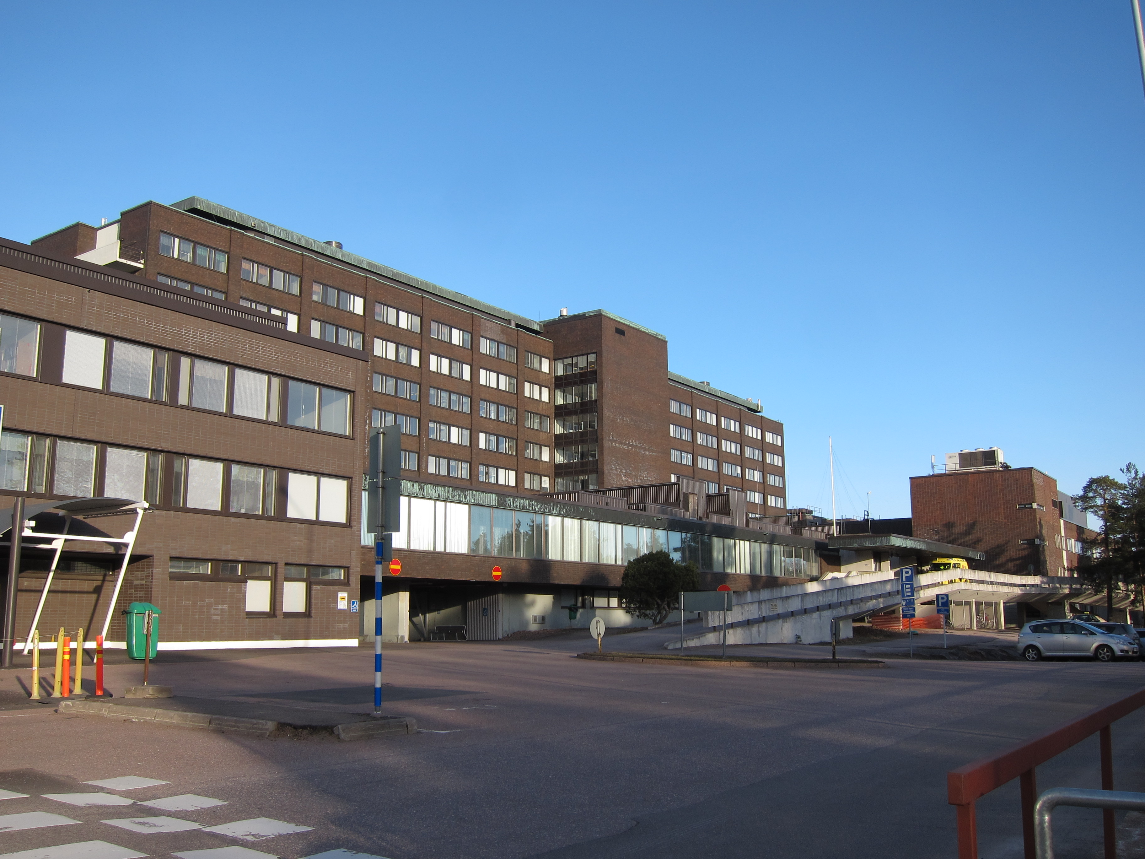 Kymenlaakson keskussairaalan rakennuksia Kotkassa.